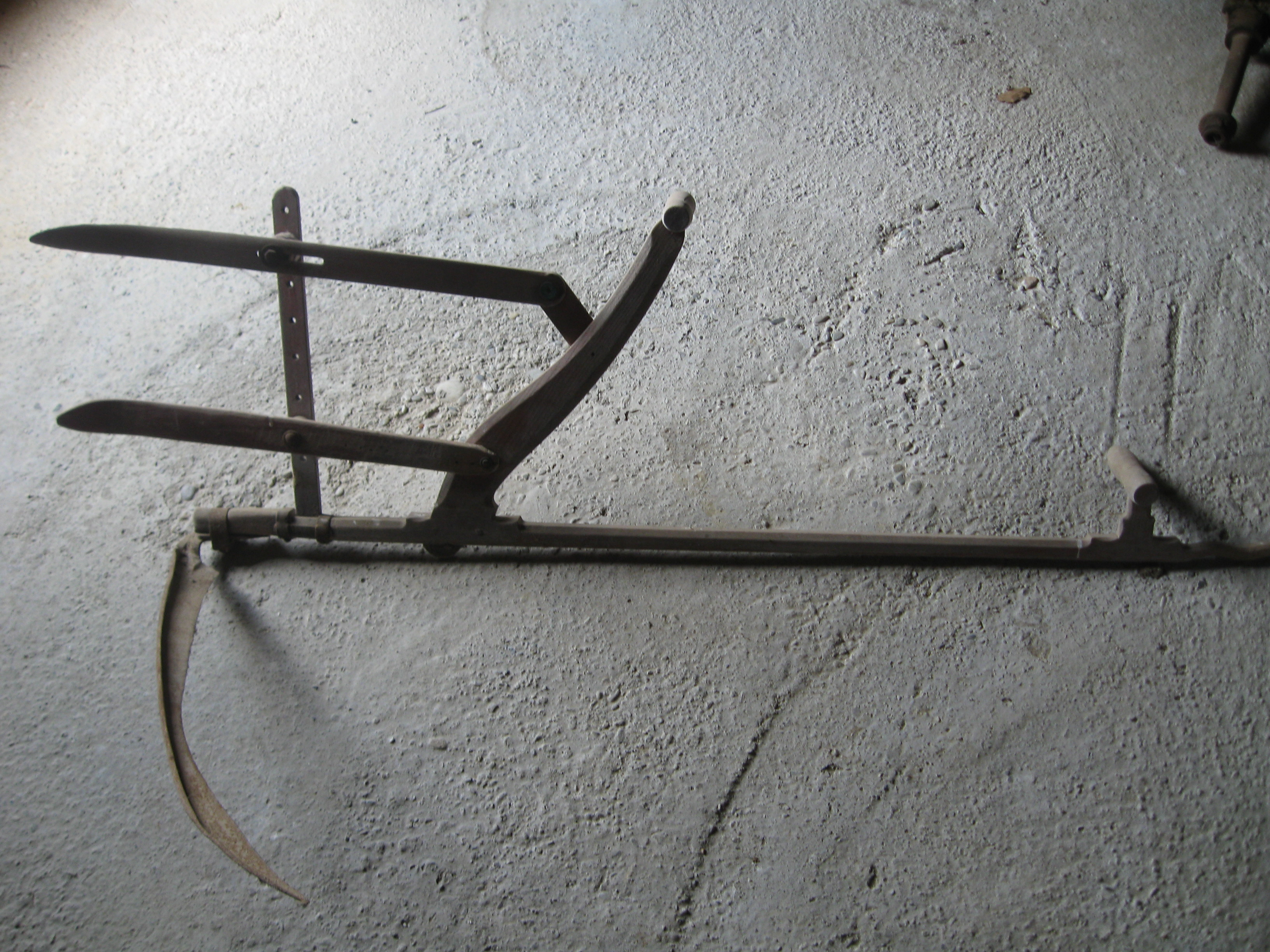 Kosa za košnjo žitaric.